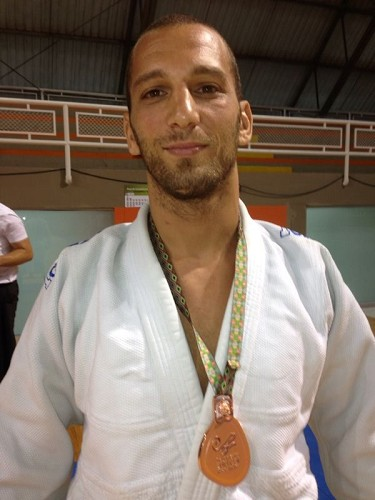 Hausa: רועי פאריינטה - זוכה מדליית ארד במשחקי העולם 2013